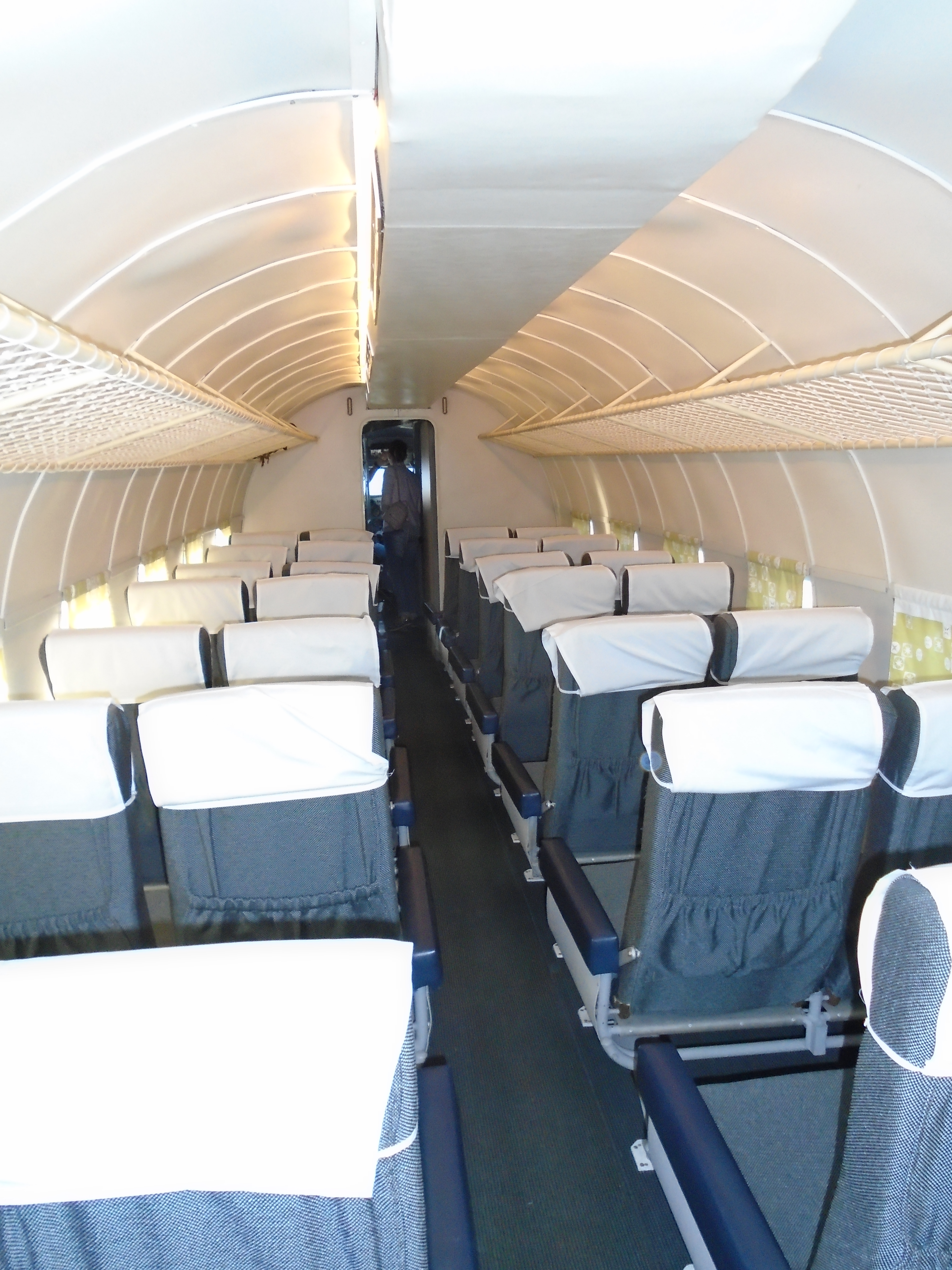 Varig PP-ANU